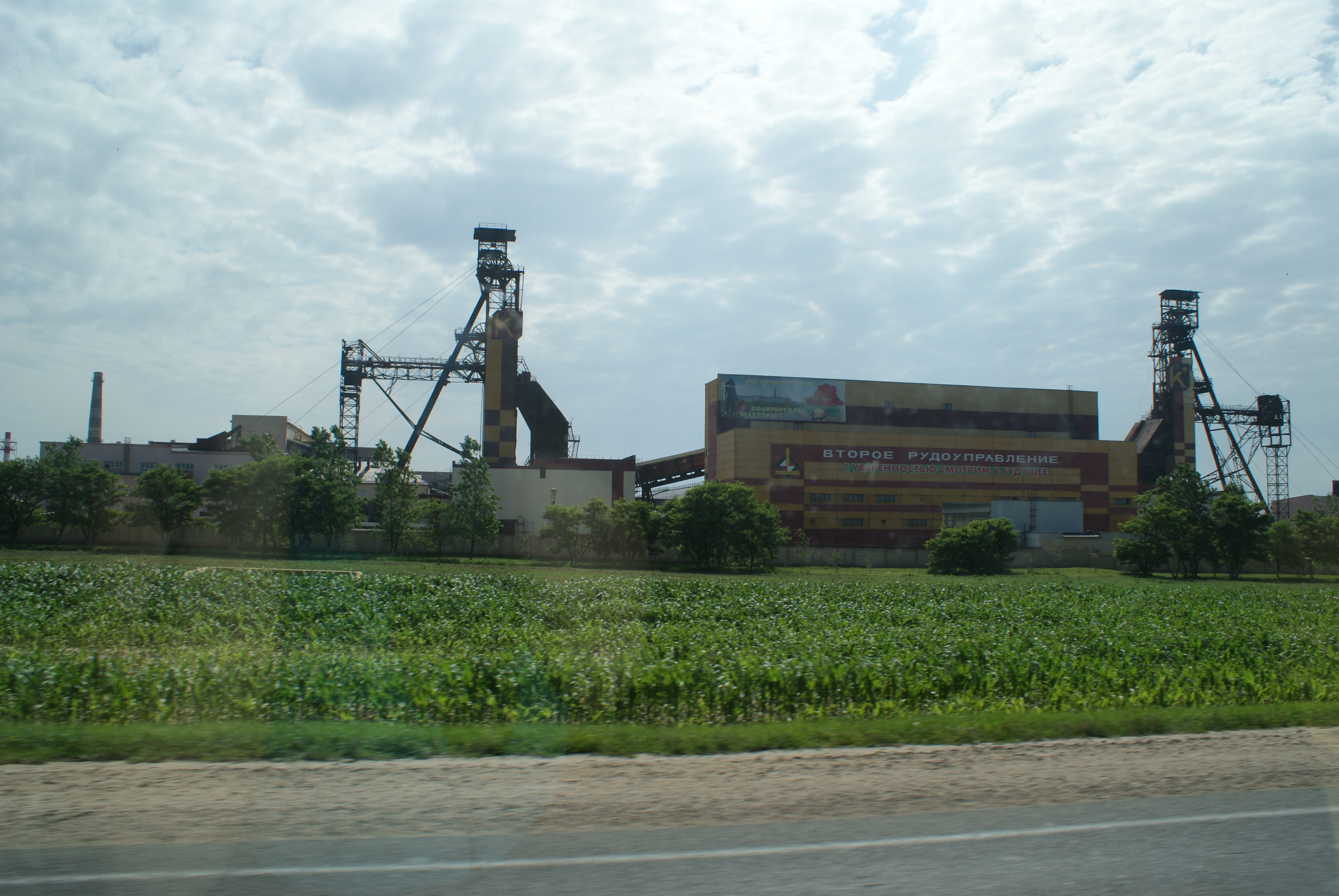 Другое рудаўпраўленне